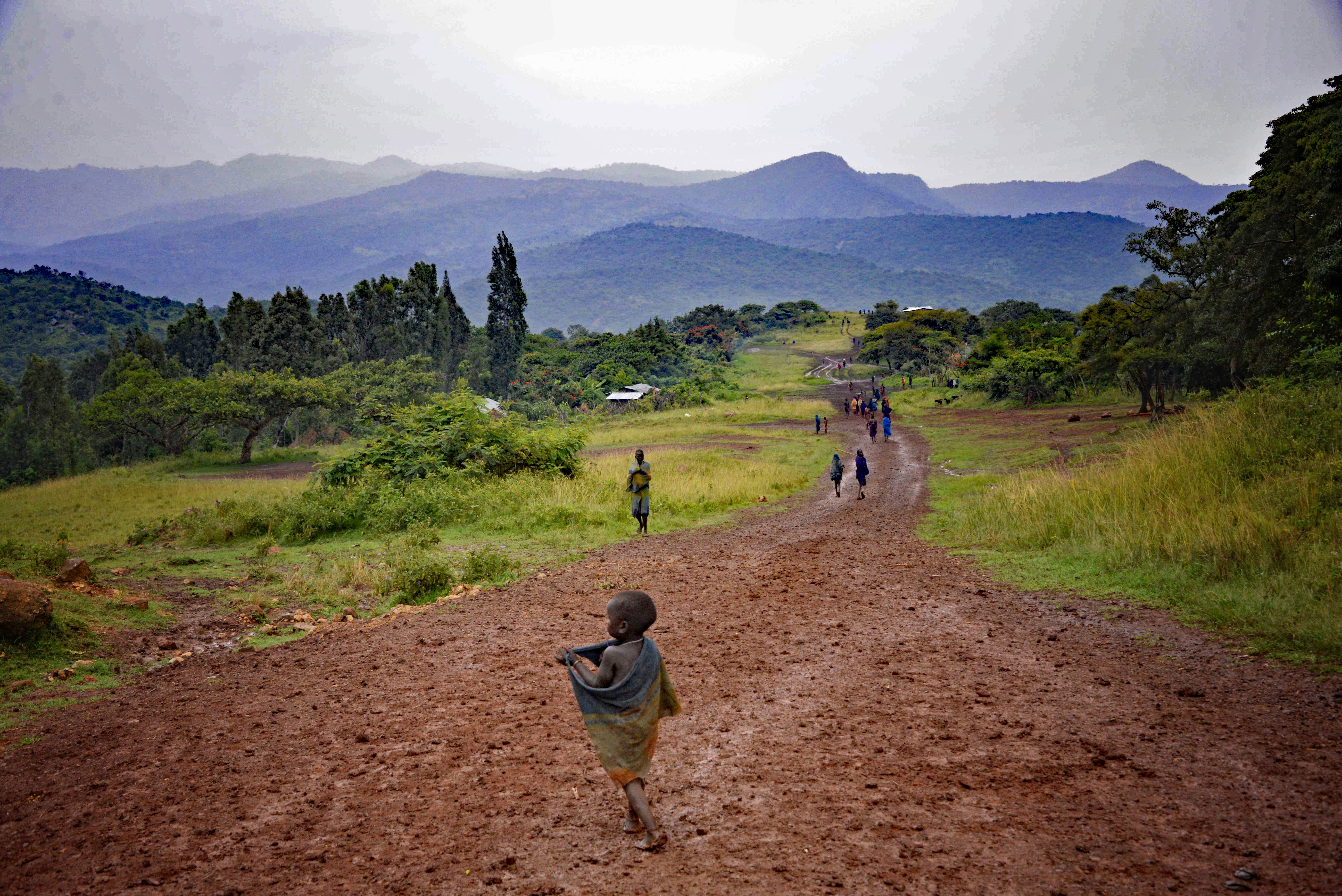 Ethiopia